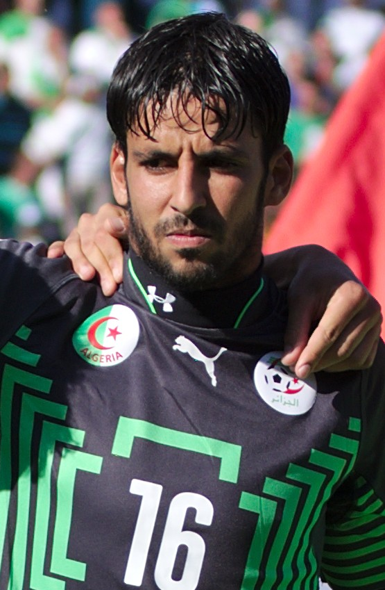 Algérie - Arménie - 20140531 - Aissa Mandi (20), Mohamed Lamine Zemmamouche (16) et Mehdi Lacen (8)